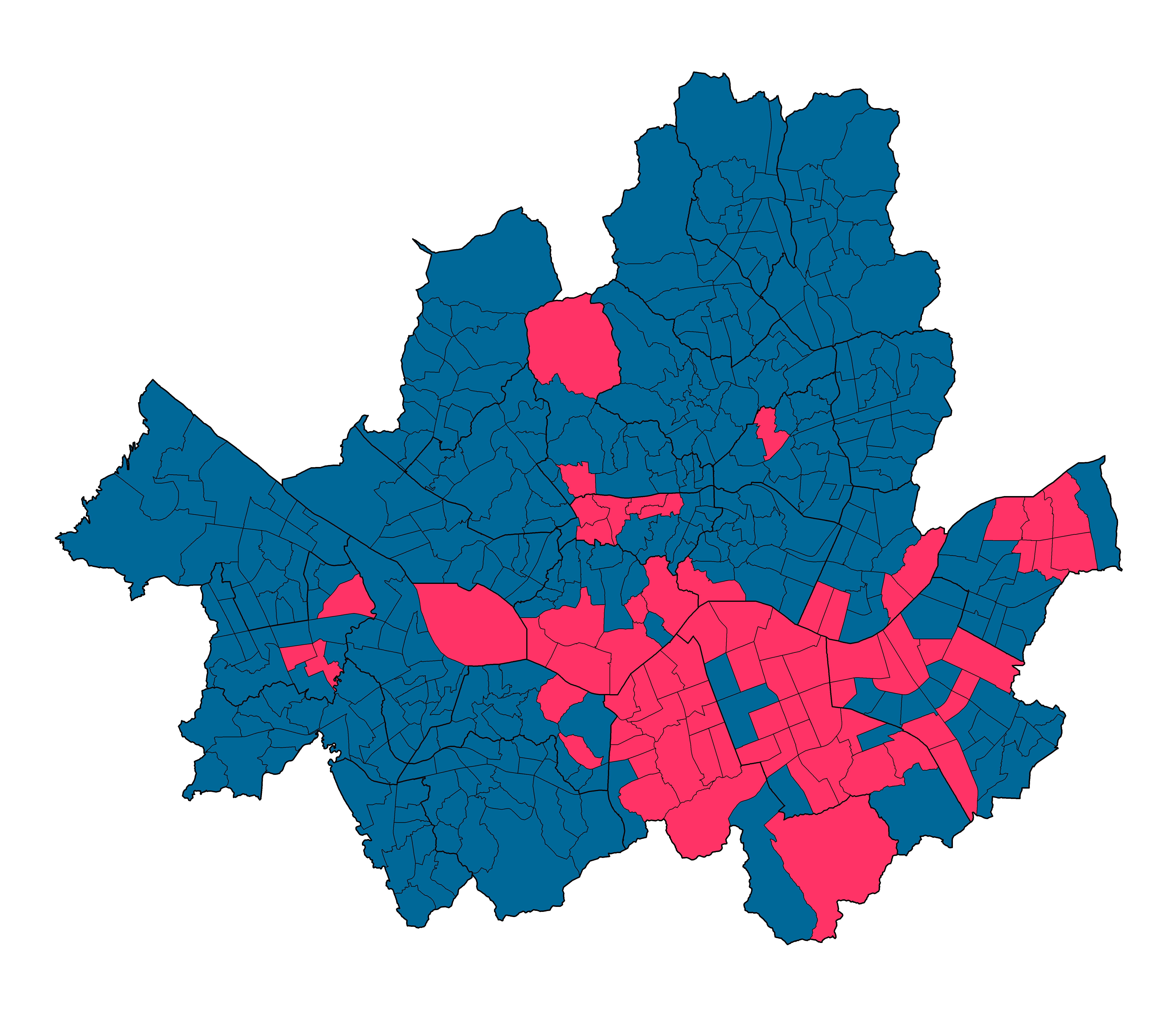 서울시 백지도로 만든 지역구 국회의원 선거에서(비례투표 제외), 각 동 별로 1등한 후보의 정당을 색칠한 지도